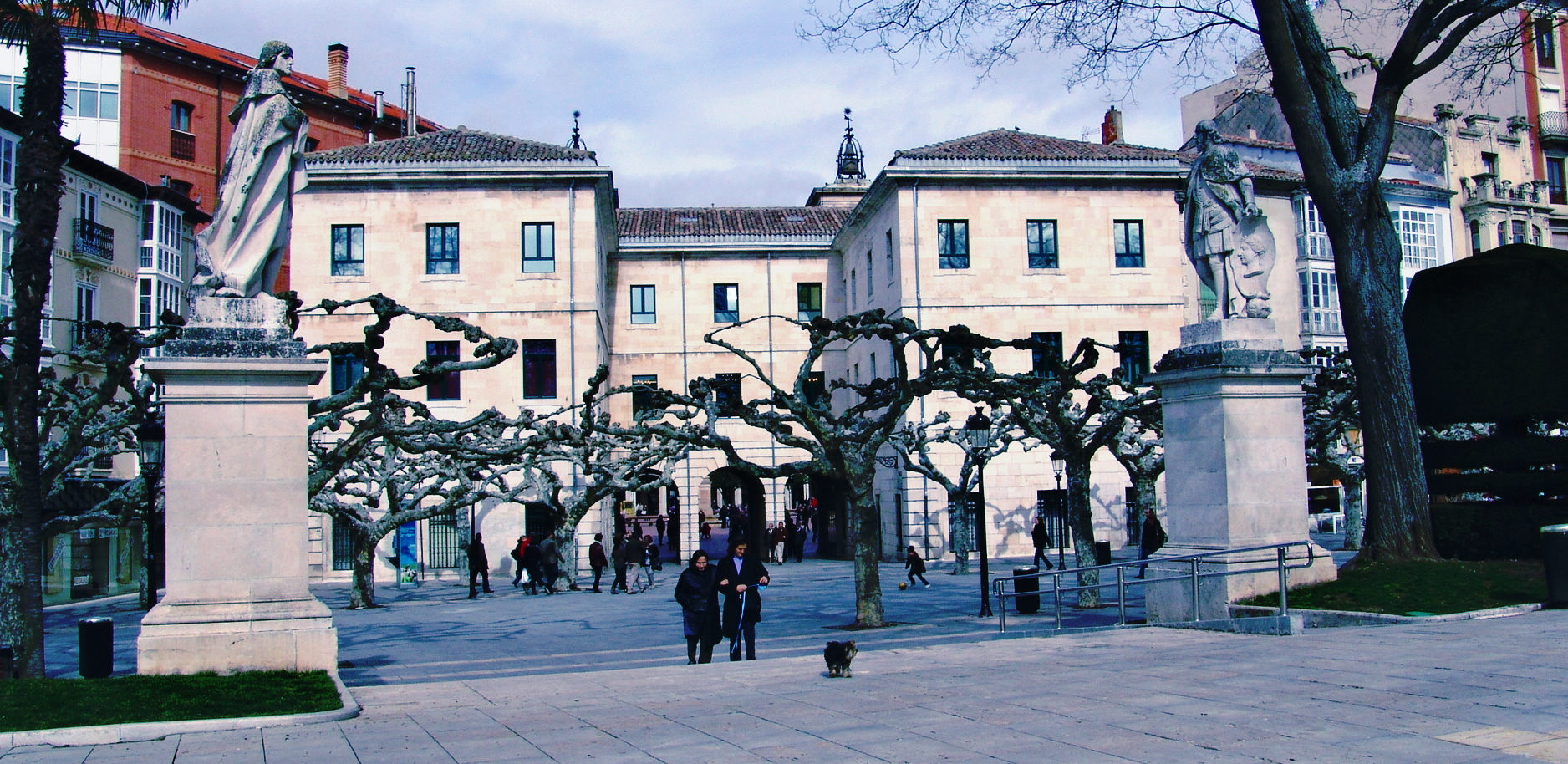 Puerta de Carretas, actales Casas Consistoriales, Paseo del Espolón, Burgos, España